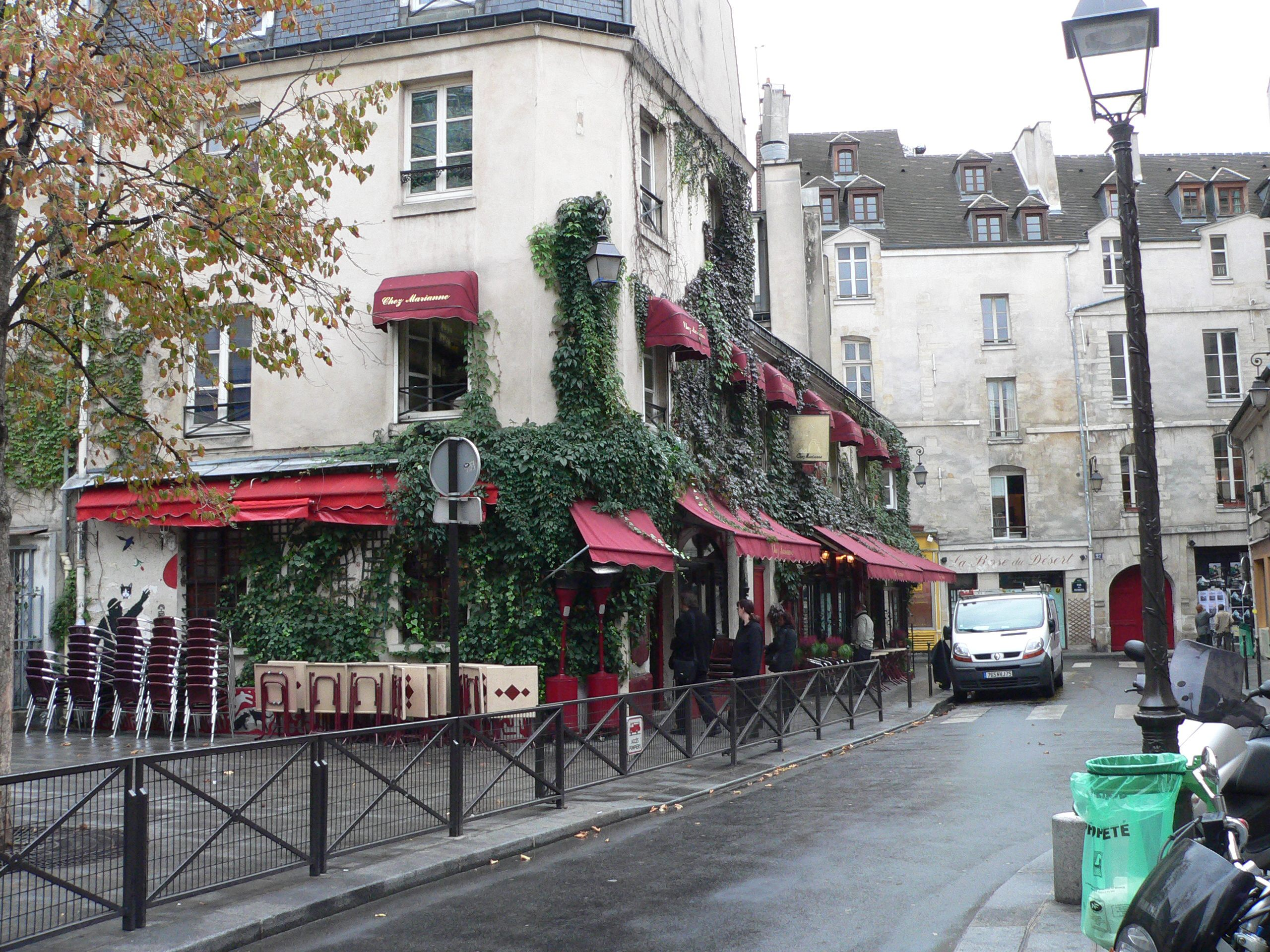 Restaurant Chez Marianne, 2 rue des Hospitalières Saint-Gervais, IVe arrondissement, Paris, France.